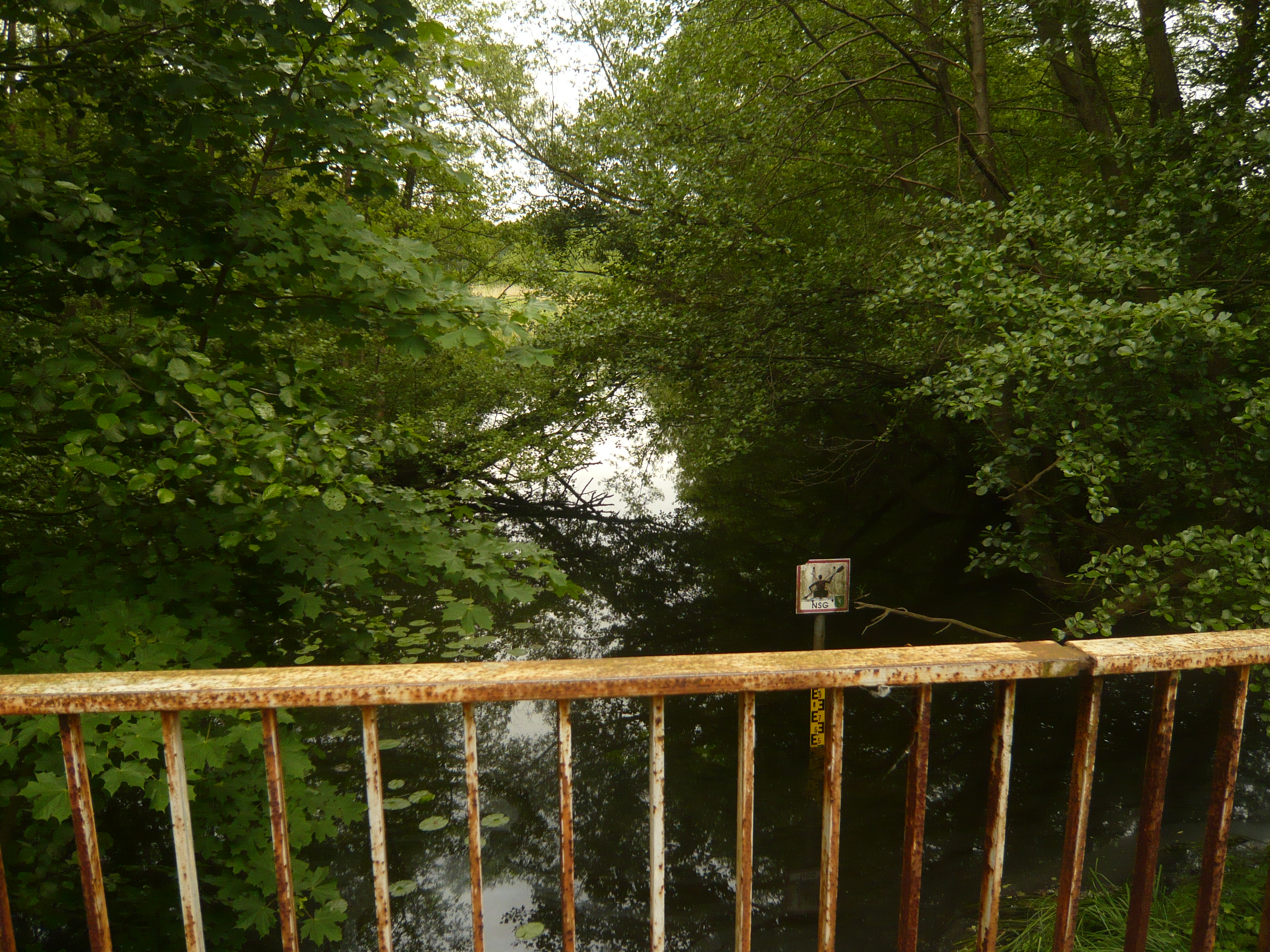 Wandlitz / Ützdorf: östlichster Zipfel des Liepnitzsees